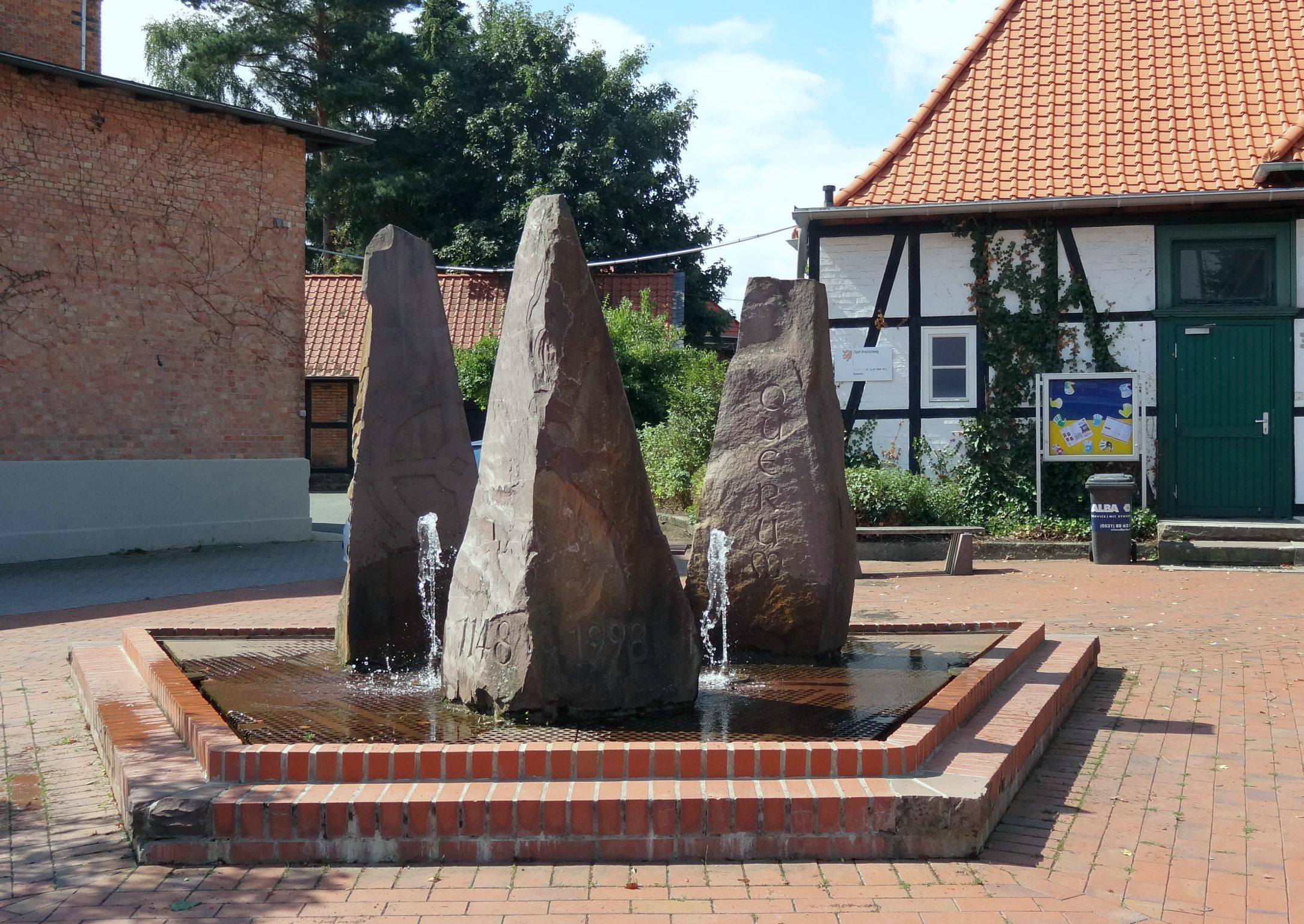 Jubiläumsbrunnen 850 Jahre Querum an der Bevenroder Straße in Braunschweig-Querum.